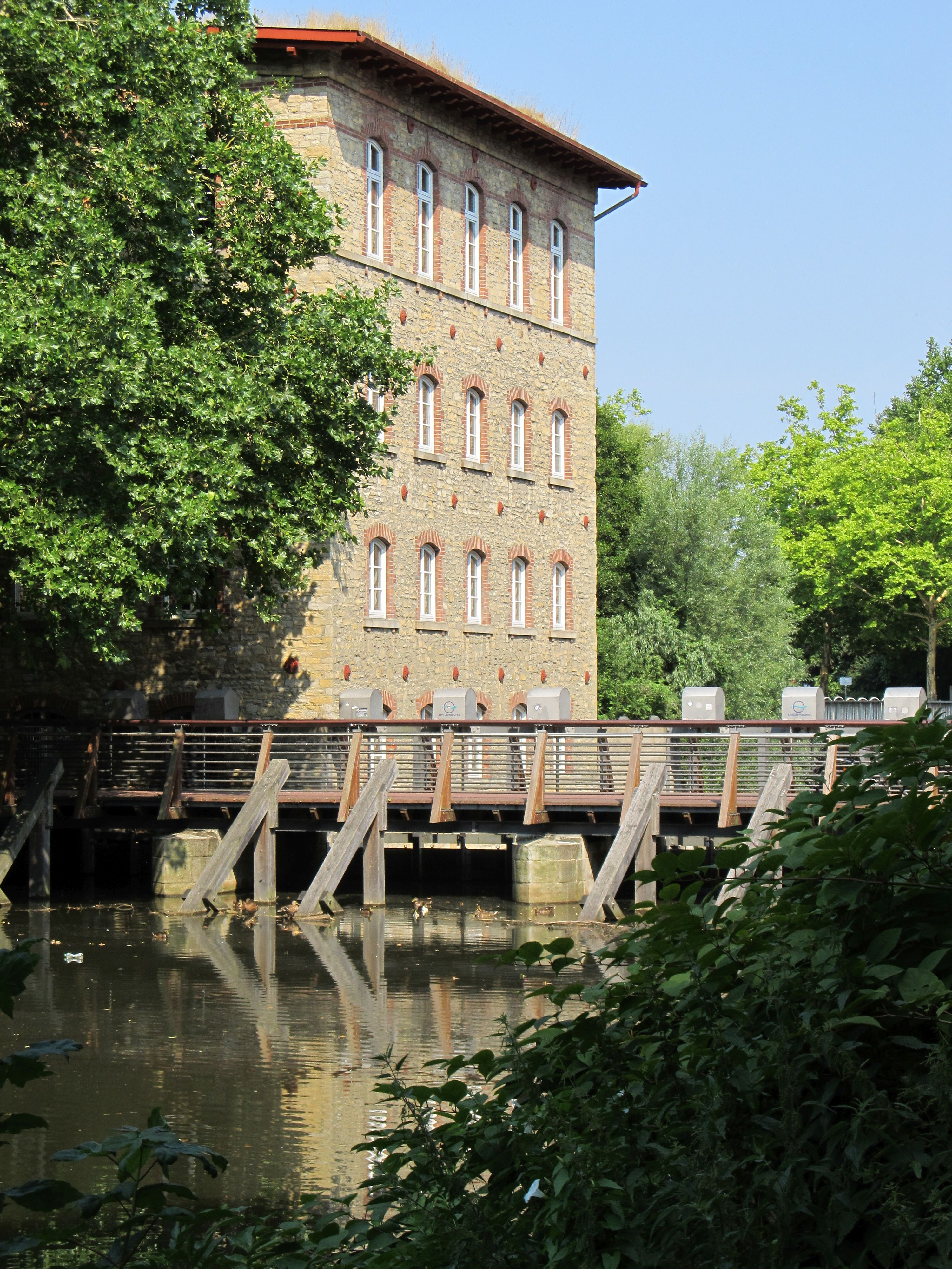 Hase (Fluss) Pernickelmühle in Osnabrück